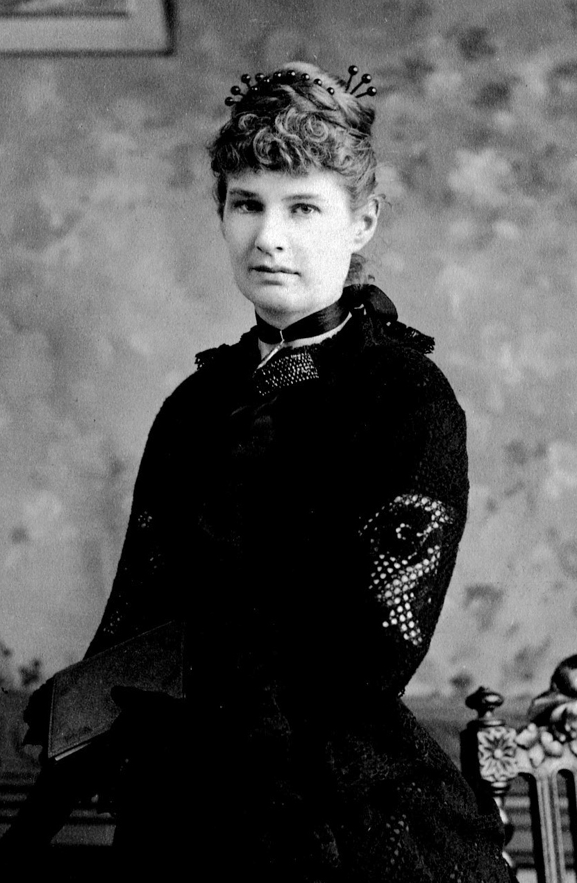 Anna Kingsford